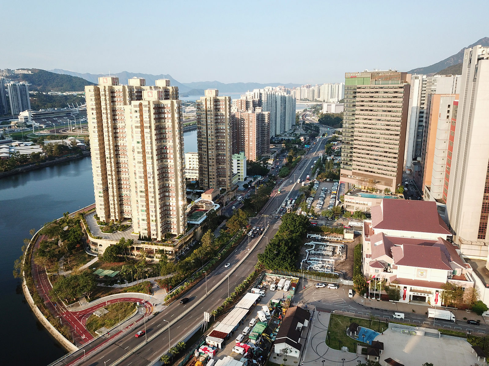 Tai Chung Kiu Road near Shek Mun